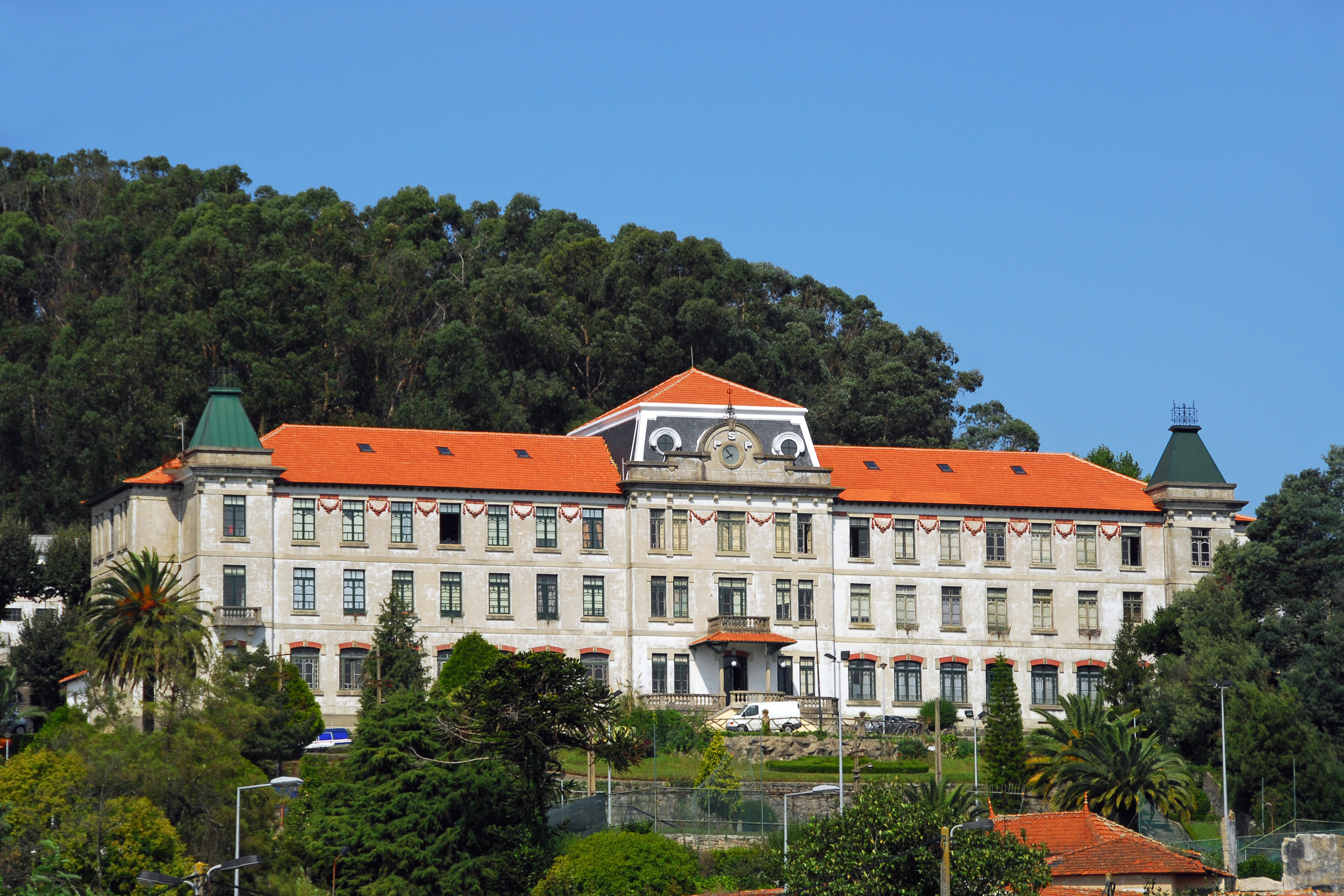 Quartel da GNR da Bela Vista ou Quinta da Bela Vista ou Quartel da Guarda Nacional Republicana. Em Portugal, Porto, Porto, Campanhã. This monument is classified as Monumento de Interesse Público.